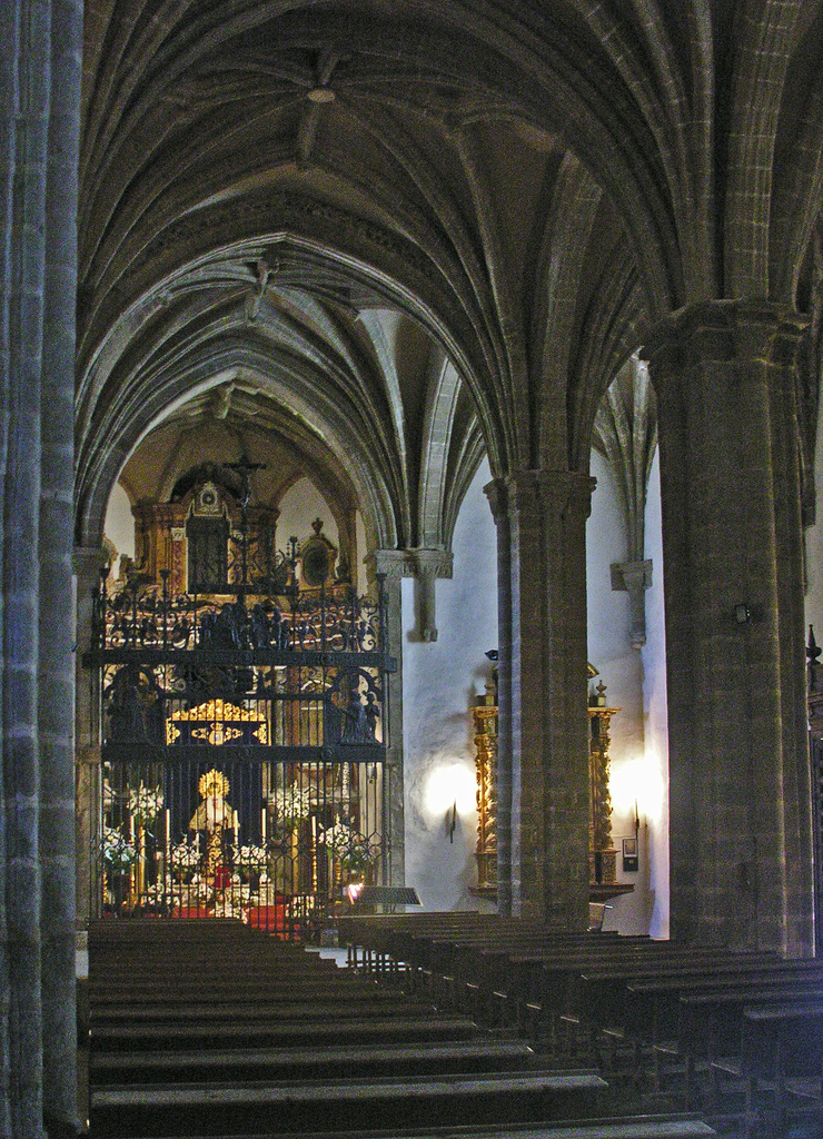 Interior de la iglesia gótico-mudéjar del castillo de Aracena, Huelva, España